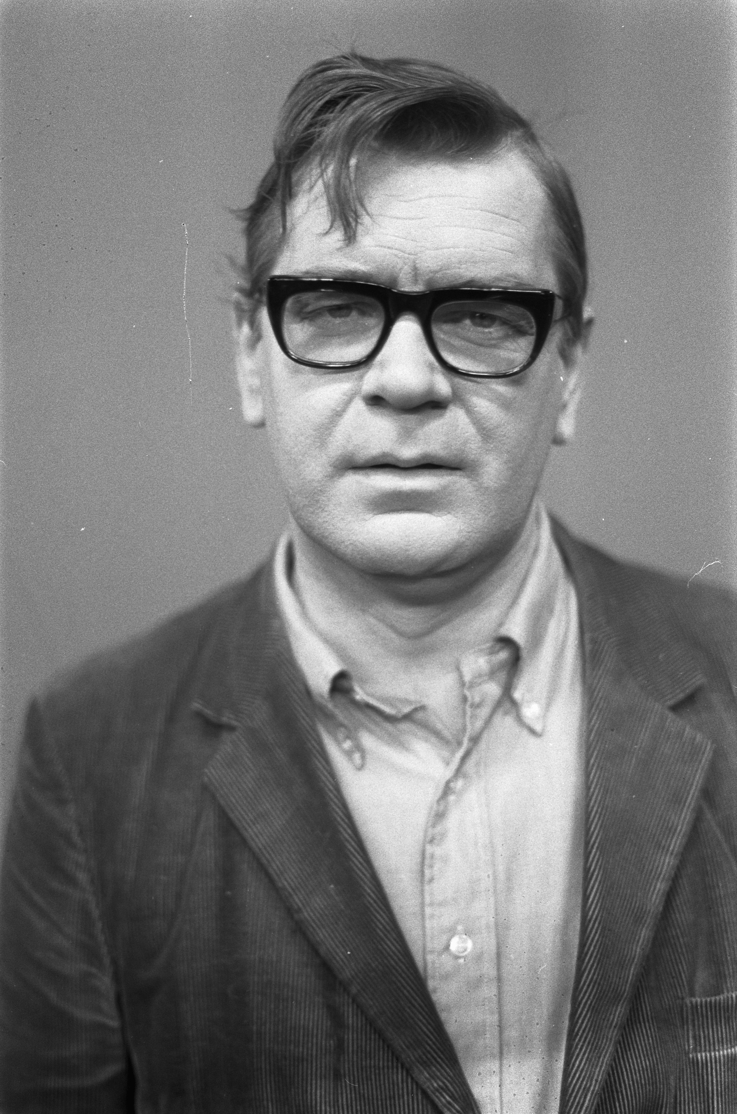 Televisieprogramma, Het oproer kraait, Jaap van de Merwe kop